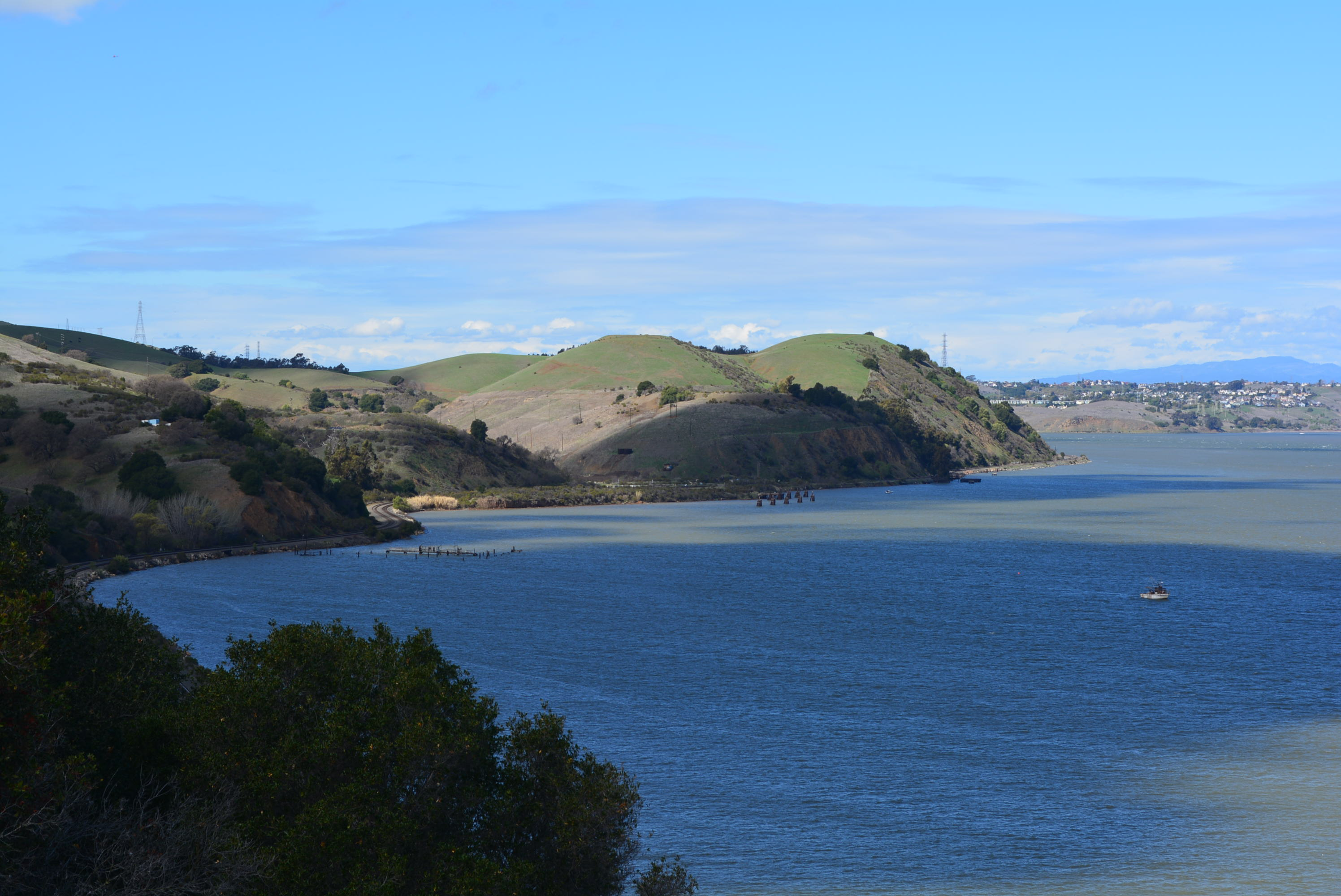 Carquinez Regional Shoreline